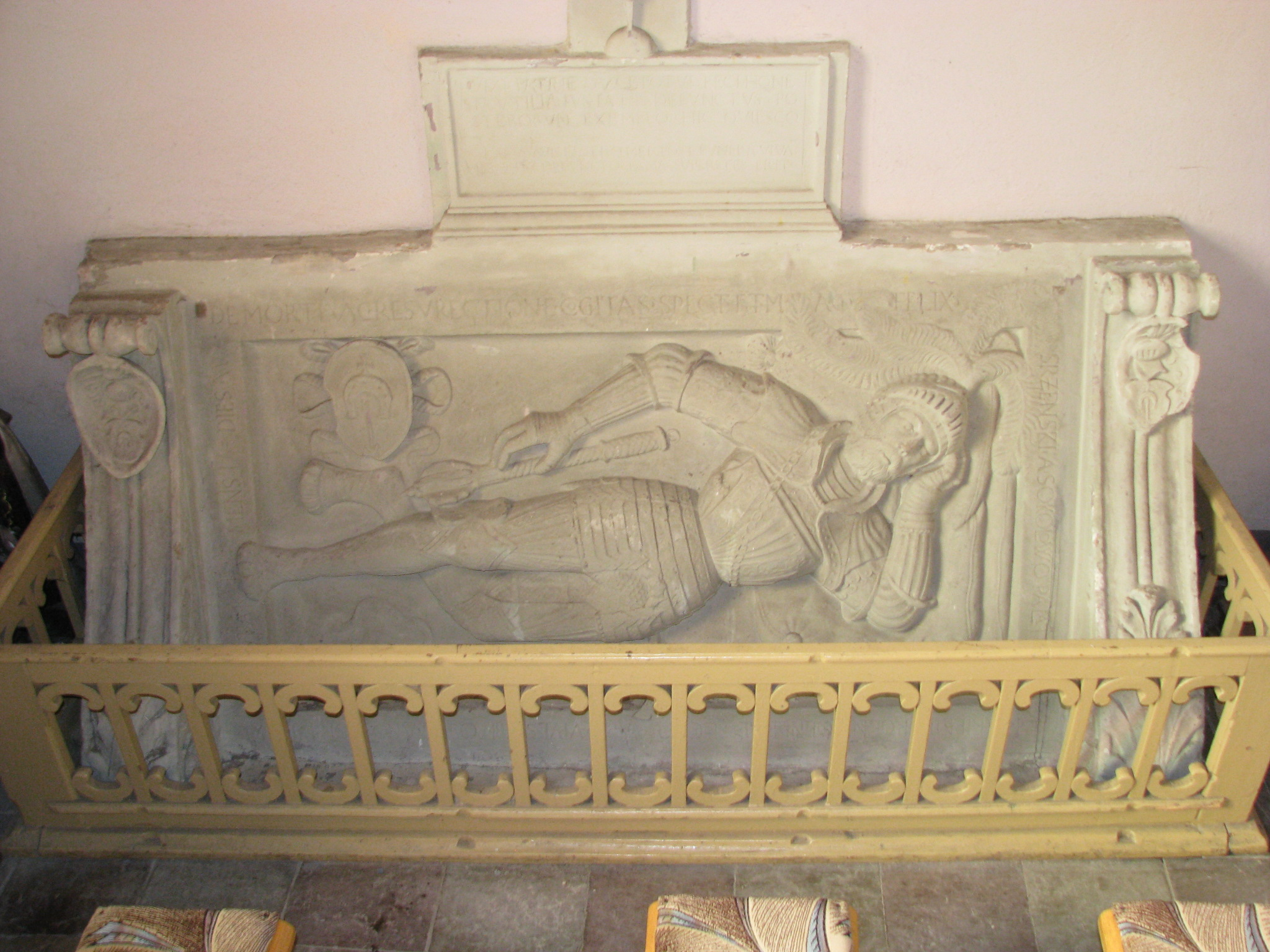 Szreńsk, kościół, kaplica pod wezwaniem św. Anny, nagrobek Feliksa Szreńskiego z 1546 (wystawiony za życia F. Szreńskiego), piaskowiec.